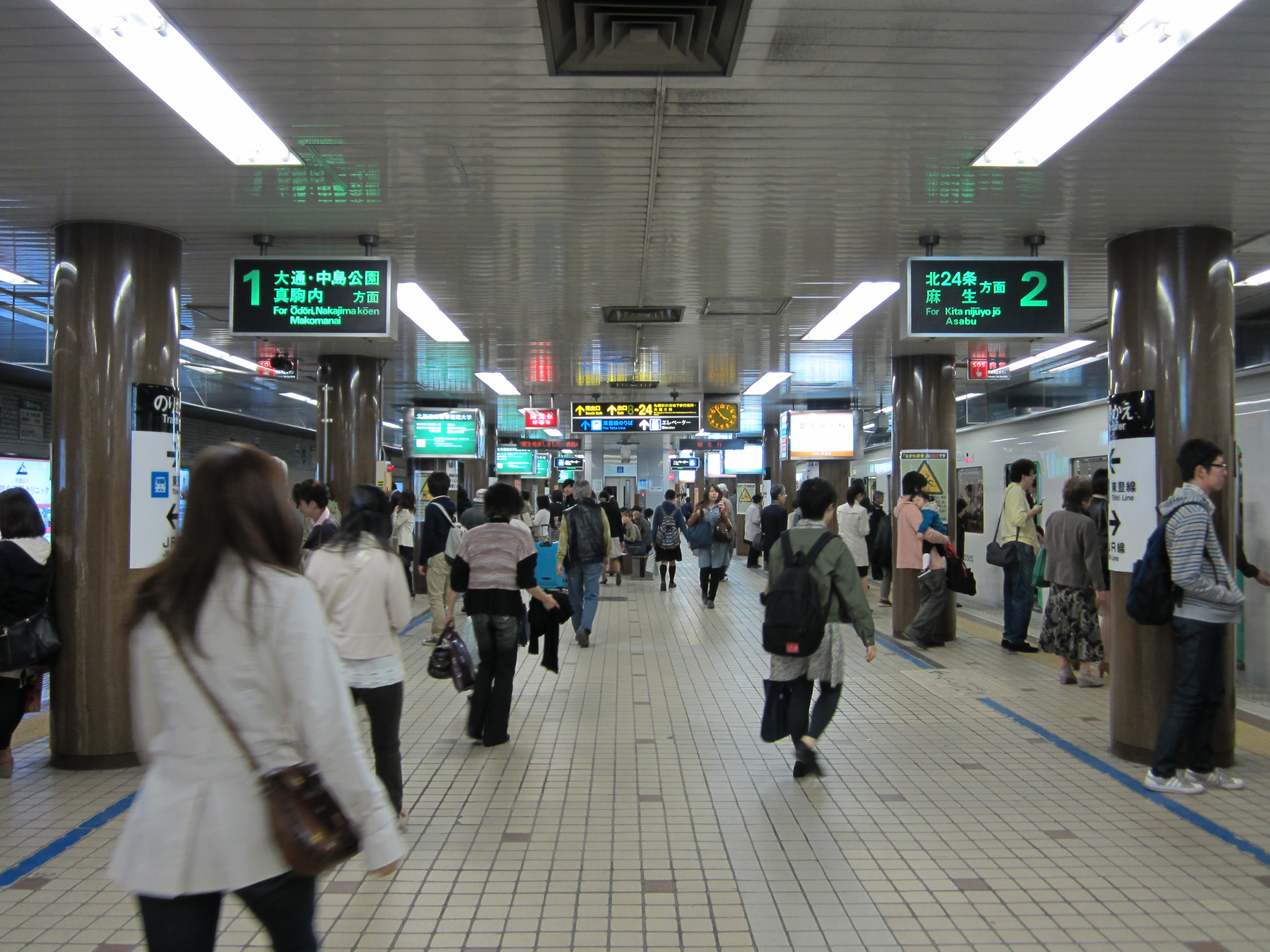 さっぽろ駅南北線ホーム（南側方向の様子、麻生行きが見える）